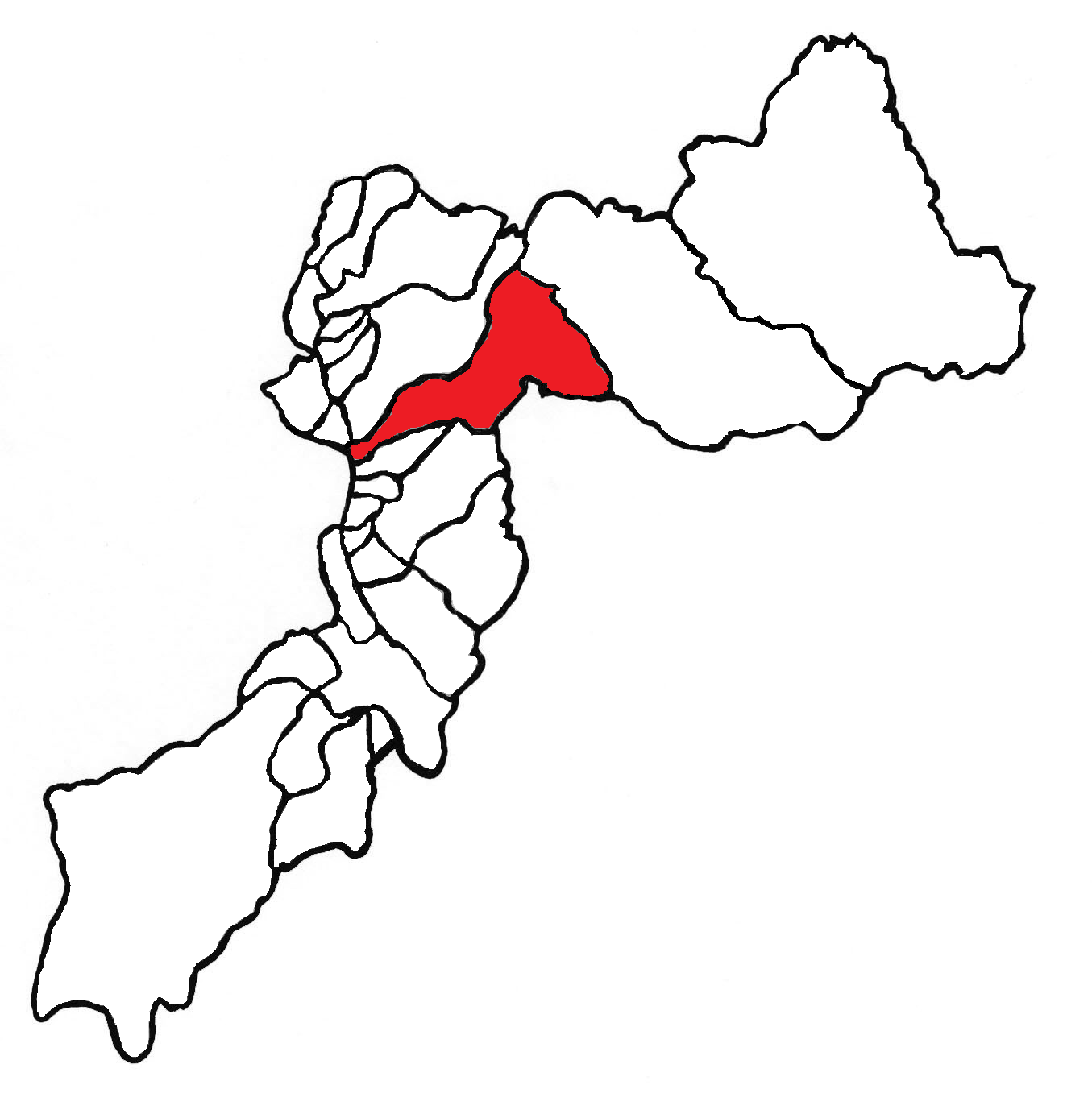 Ubicación del distrito en la provincia de Huancayo, departamento de Junín, Perú